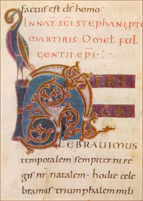 Lektionar Reichenau, 2. Drittel des 10. Jahrhunderts Manuscript in the Badische Landesbibliothek, Karlsruhe, Germany Cod. Aug. perg. 16, Bl. 32r